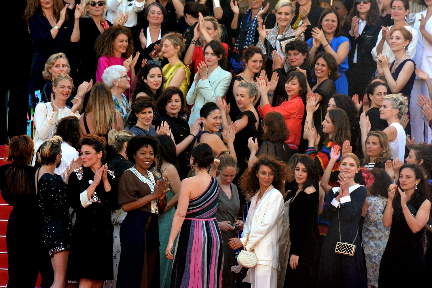 Manifestation pour l'égalité salariale et la parité dans le cinéma, organisée pendant le festival de Cannes